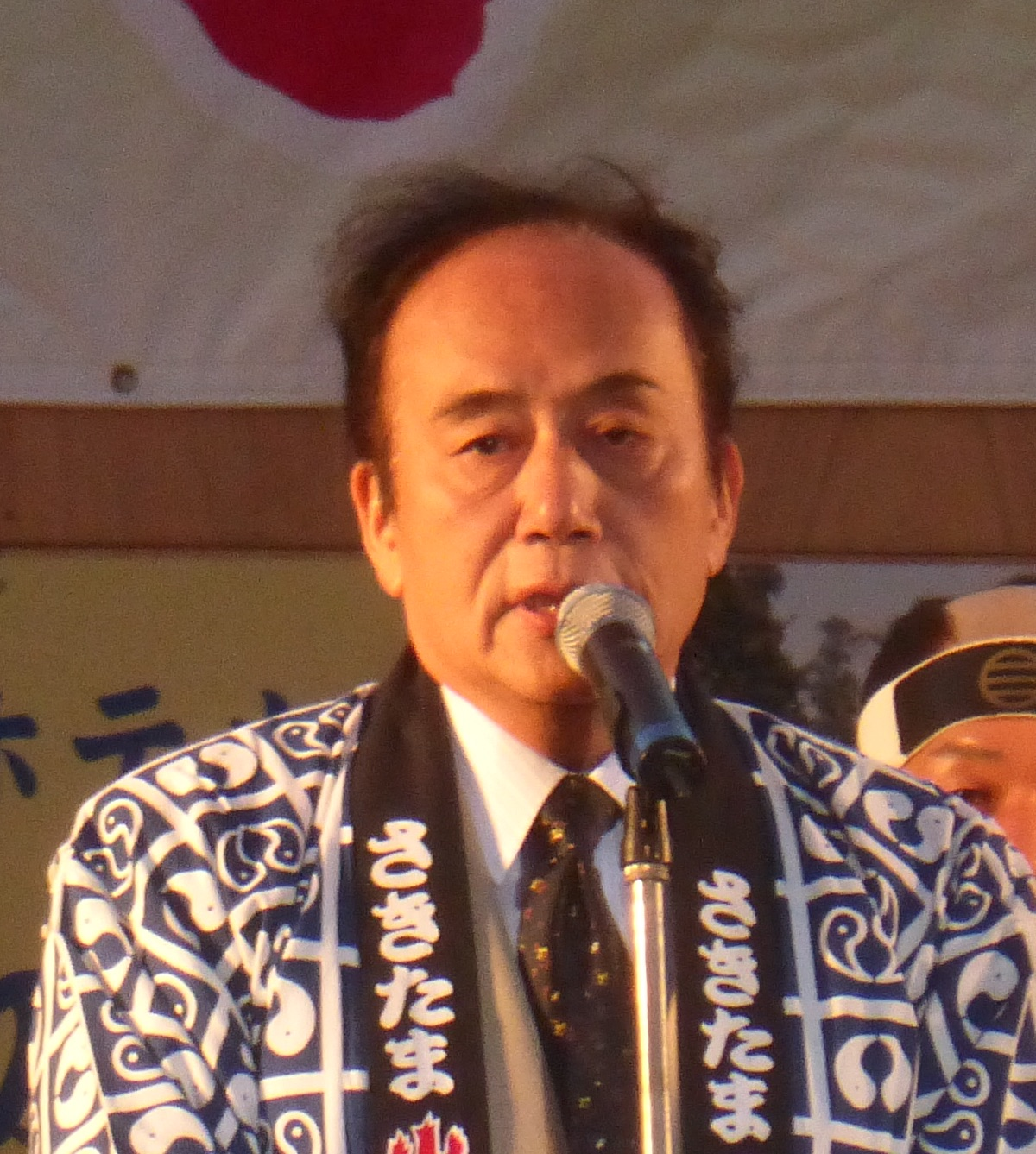 上田清司、さきたま火祭りにて (埼玉県知事) Saitama prefectural governor Kiyoshi Ueda